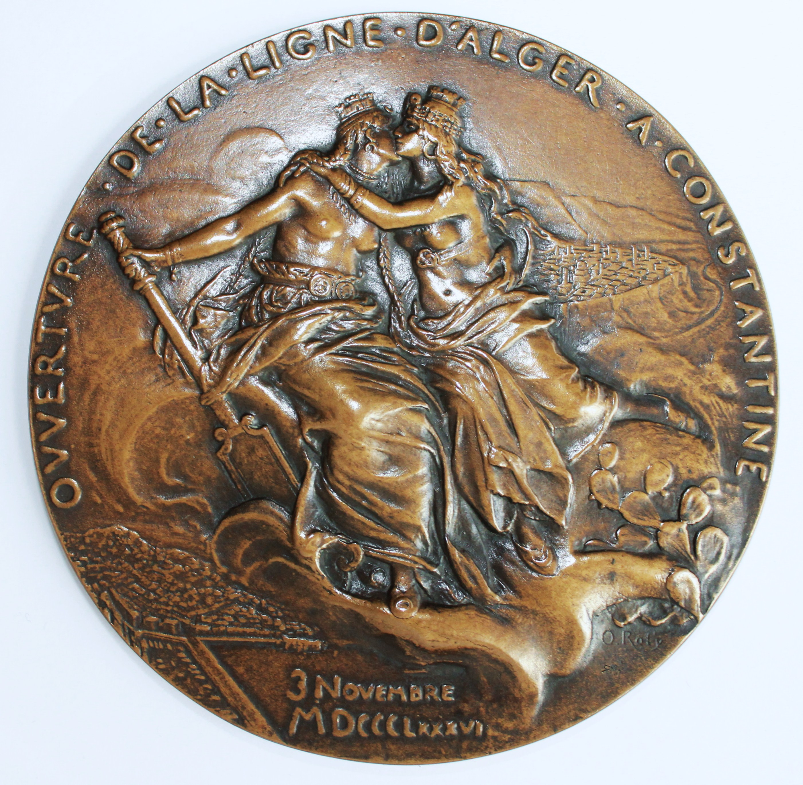 Médaille fondue (98 mm) de la Compagnie de l'Est algérien Ouverture de la ligne d'Alger à Constantine le 3 novembre 1886 réalisée par Oscar Roty . Les villes d'Alger et de Constantine personnifiées s'embrassent. (Médaille issue de la collection personnelle de Roger Marx)